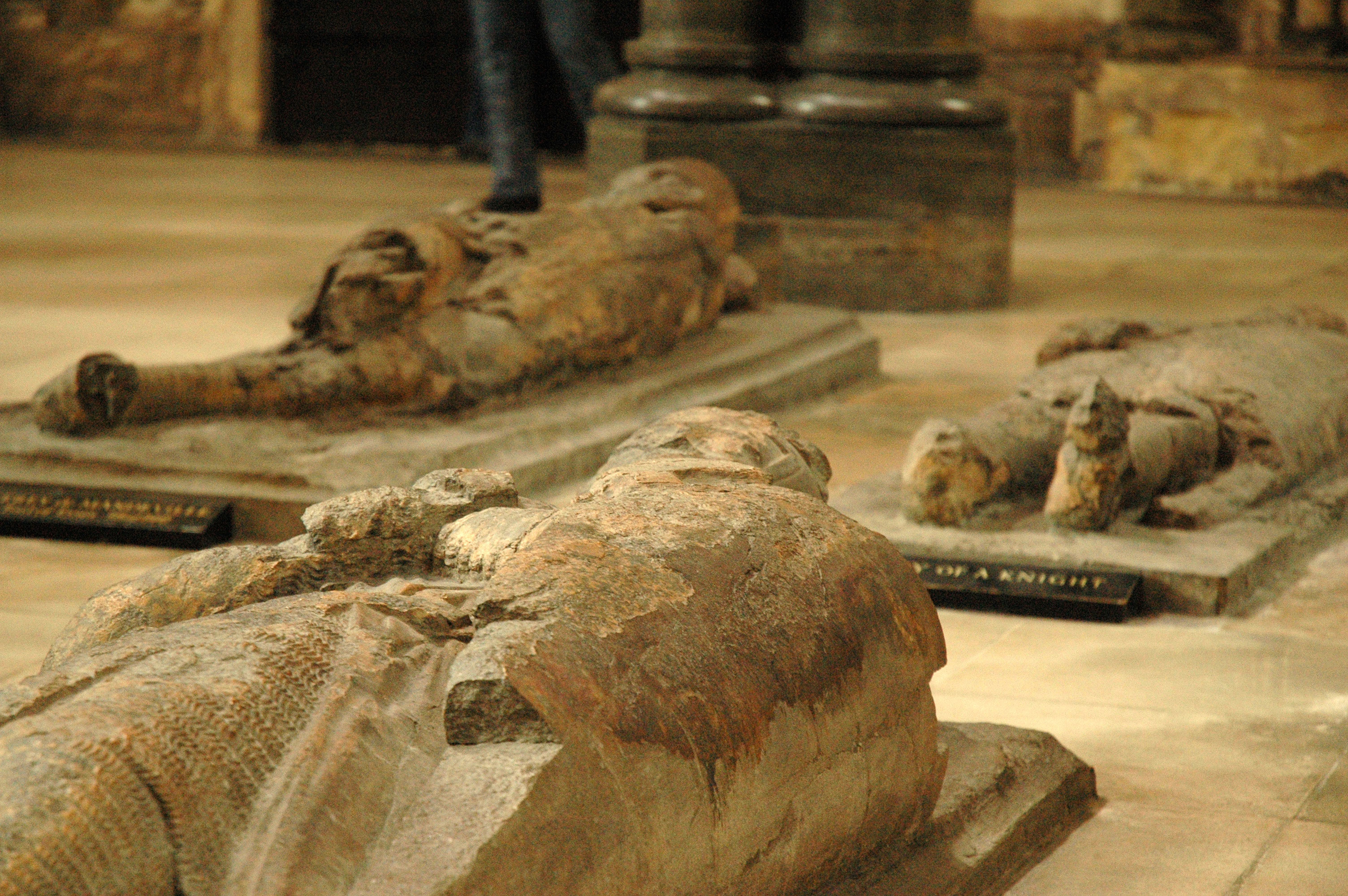 Inne i Temple Church, London. Foto: Kjetil Bjørnsrud 2006